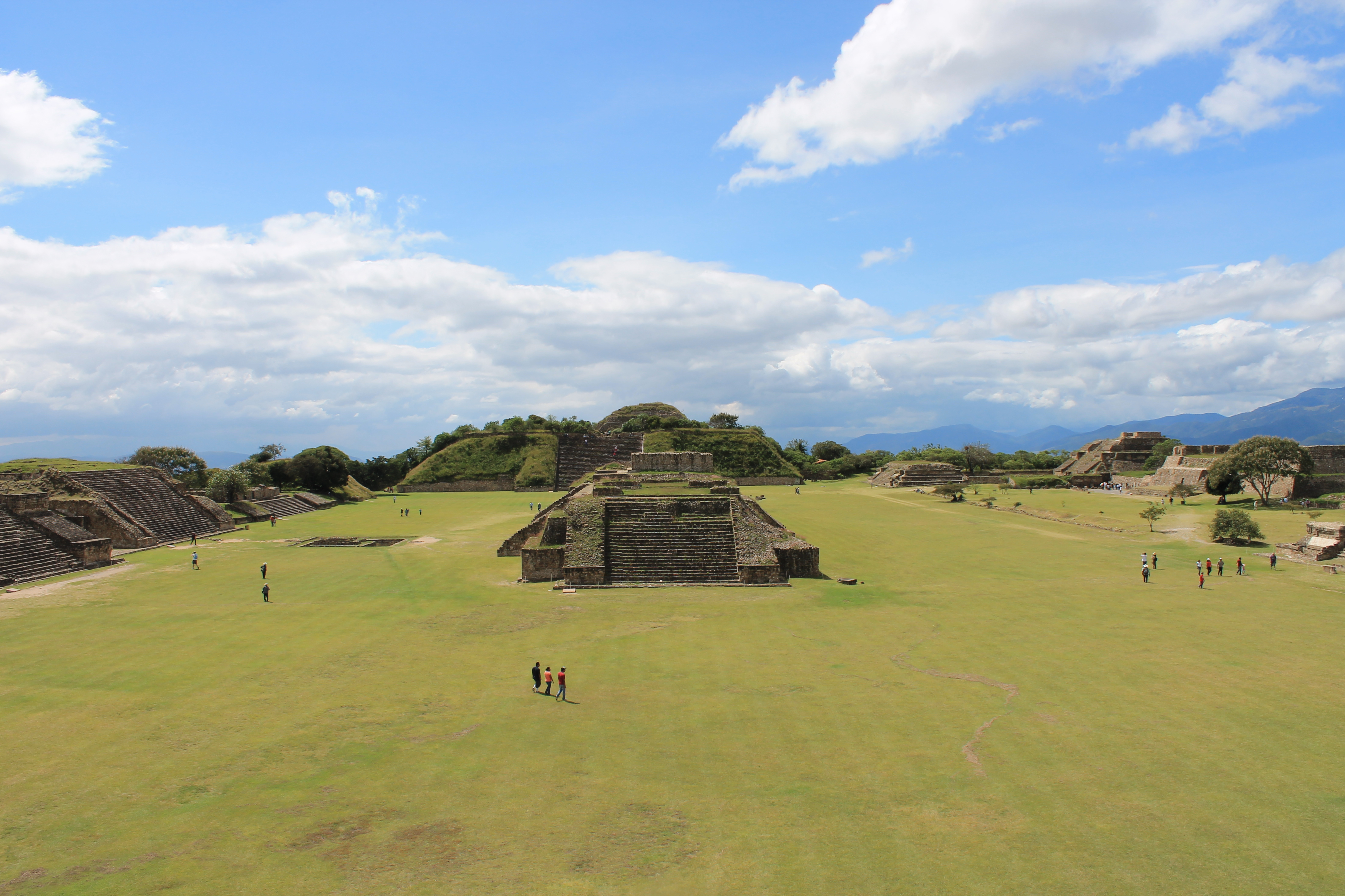 Desde la parte superior de la escalinata de piedra que conduce al Patio Hundido se aprecia la Gran Plaza. Al centro está el conjunto de edificios compuesto por los edificios J (observatorio, al fondo), I, H y G. A la izquierda se ve el Edificio P, El Palacio y el Montículo Q. Al centro al fondo se aprecia la Plataforma Sur, sobre ésta el Edificio III